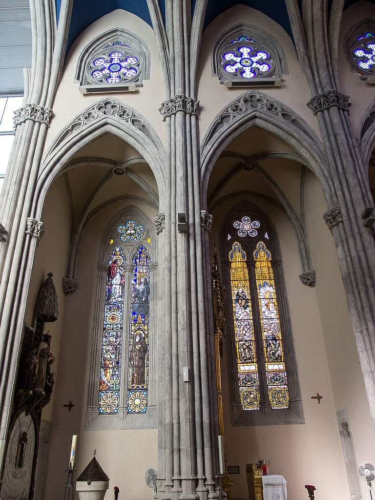 Iglesia de Sant Joan Baptista (Reus, provincia de Tarragona).